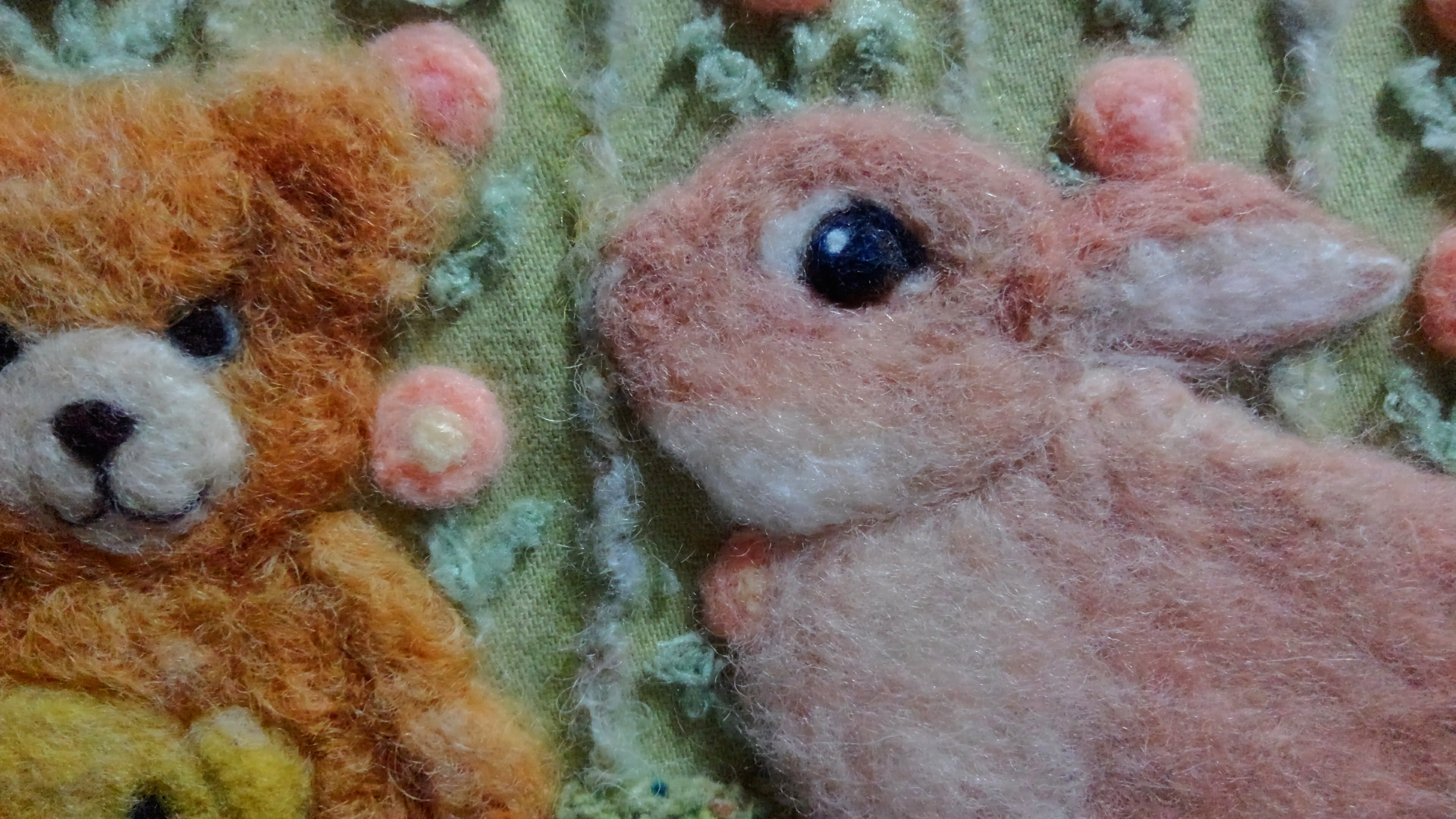 33.3×24.2cm wool, yarn, and ribbon on fabric